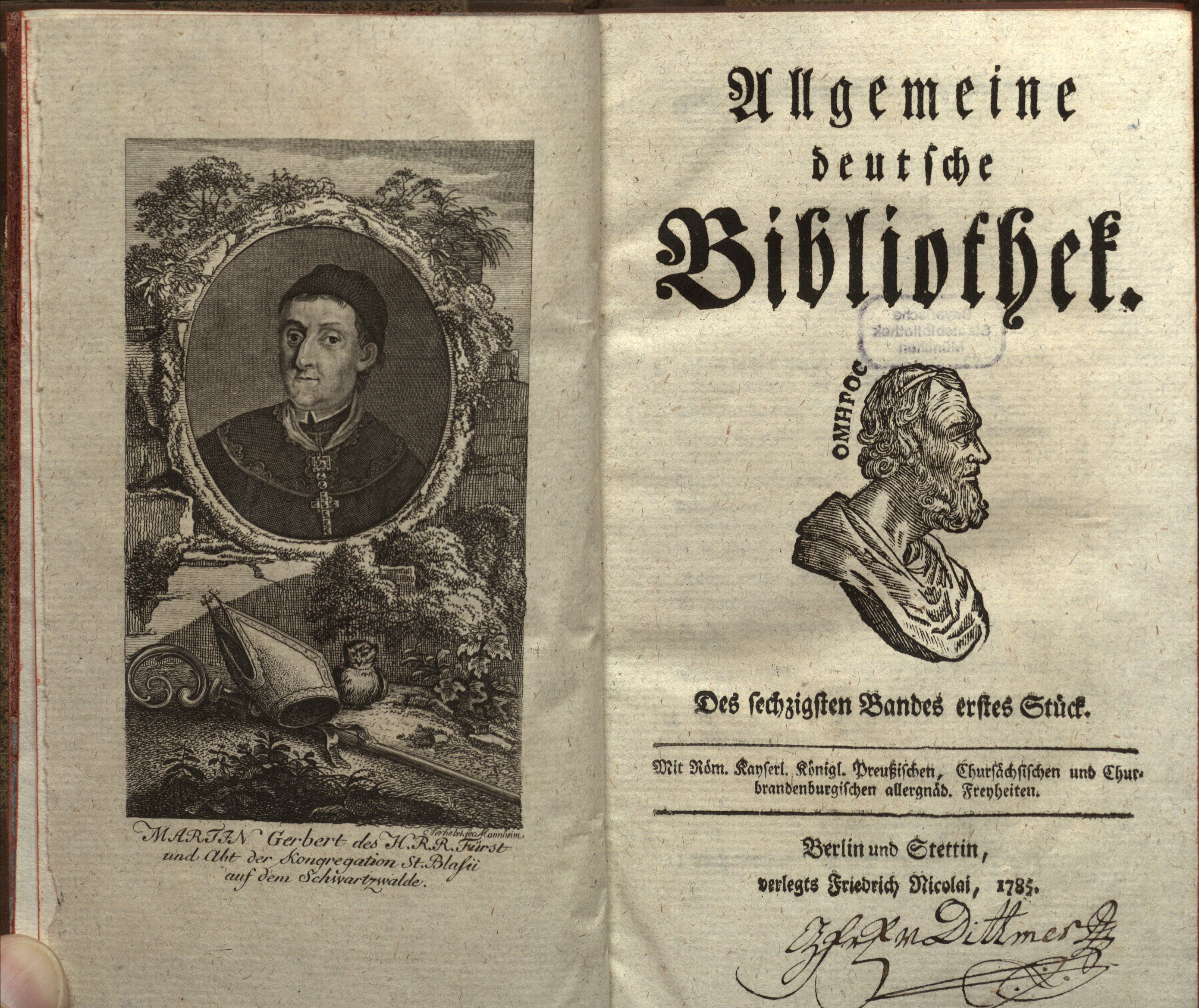 Portrait von Martin Gerbert in der Allgemeinen Deutschen Bibliothek von 1785